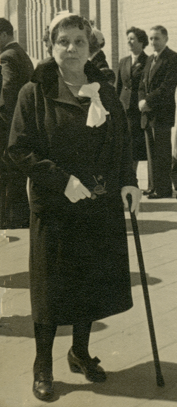 En las calles de Madrid